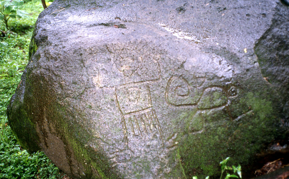 Petroglifo en la Isla de Ometepe. 2002